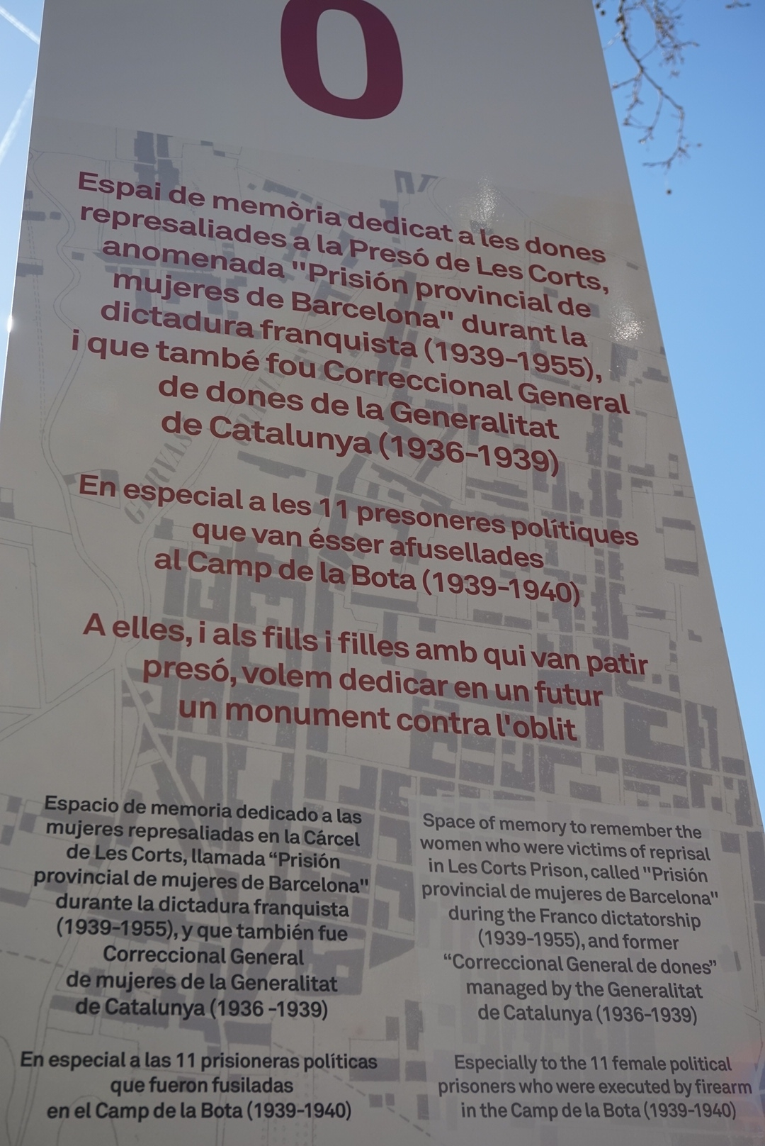 Espai de memòria dedicat a les dones represaliades a la presó de les Corts, anomenada "Prisión provincial de mujeres de Barcelona"durant la dictadura franquista (1939-1955). En especial a les 11 presoneres polítiques que van ésser afusellades al Camp de la Bota (1936-1939)a elles i als fills i filles amb qui van patir presó, volem dedicar en un futur un monument contra l'oblit.